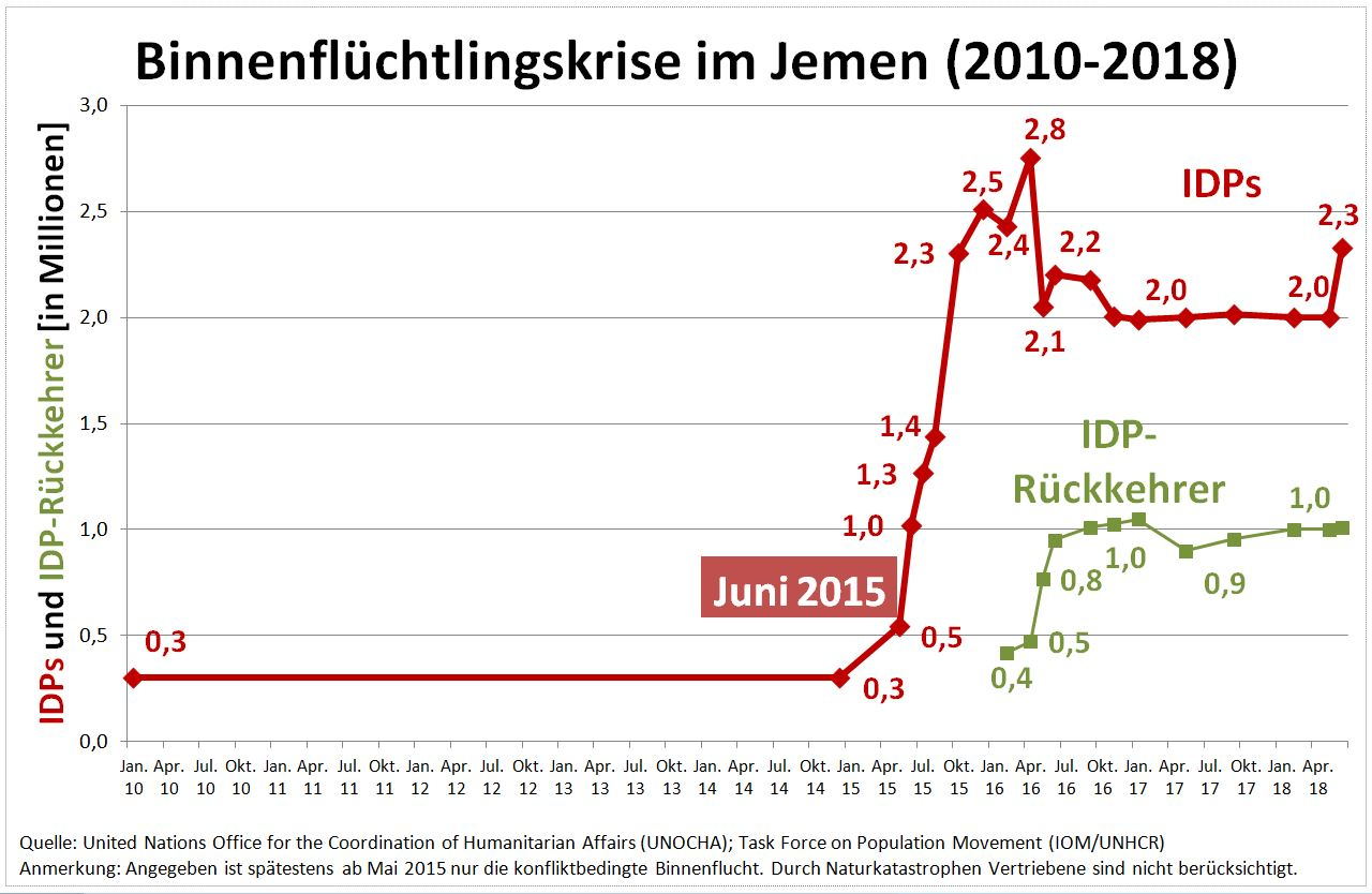 Liniendiagramm zur Binnenflüchtlingskrise im Jemen (Wertebereich Januar 2010 bis März 2016) auf Basis von UN-OCHA-Angaben.